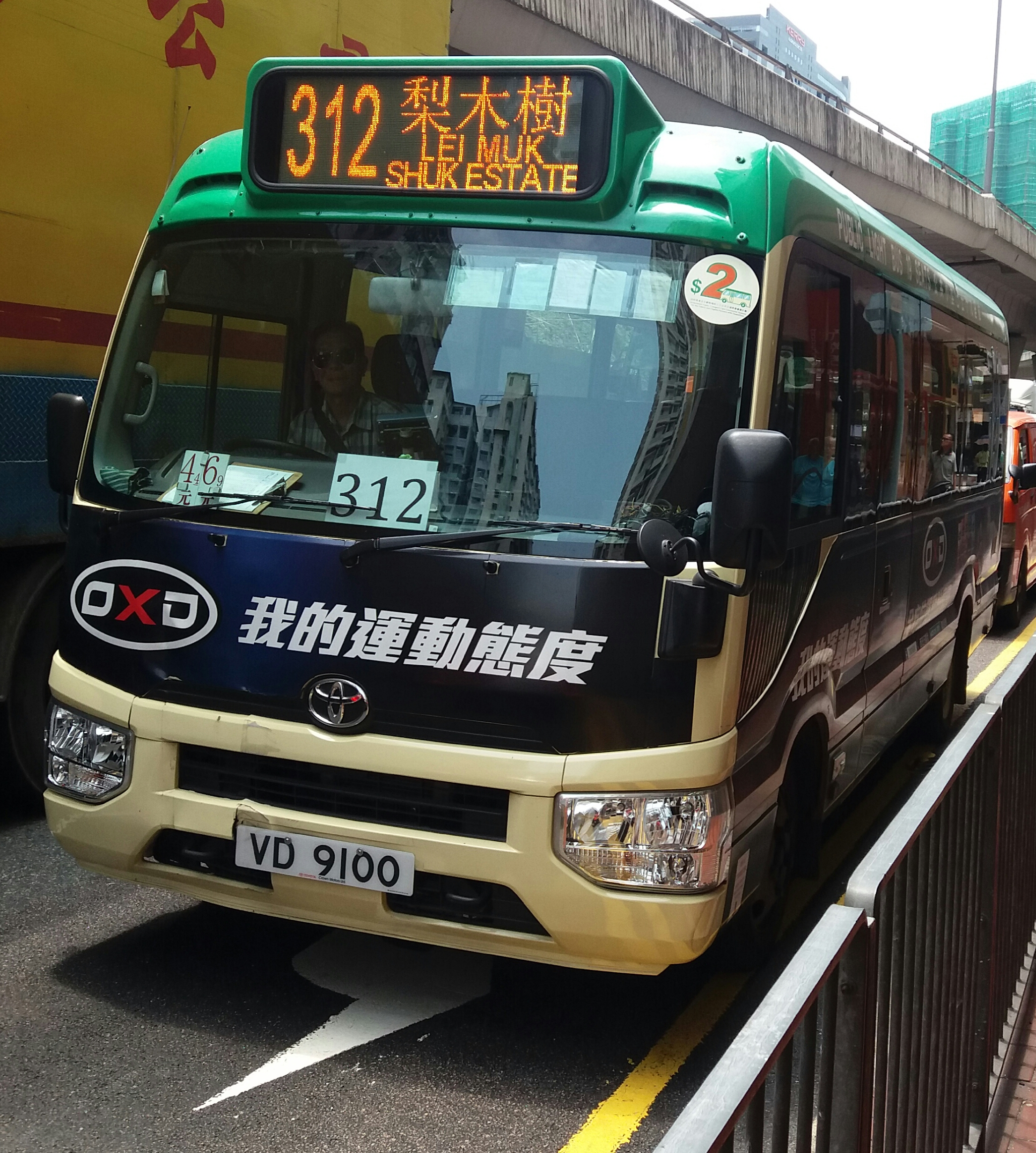 中文（香港）: 新界專線小巴312線已全線使用19座小巴行駛